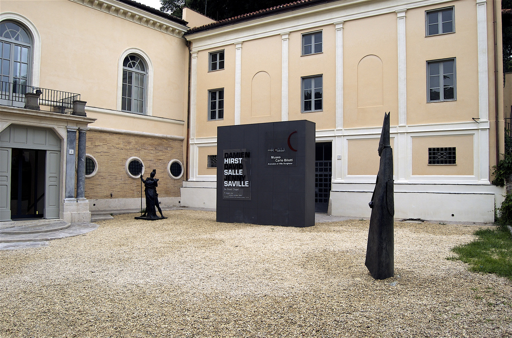 Roma, Lazio, Italia